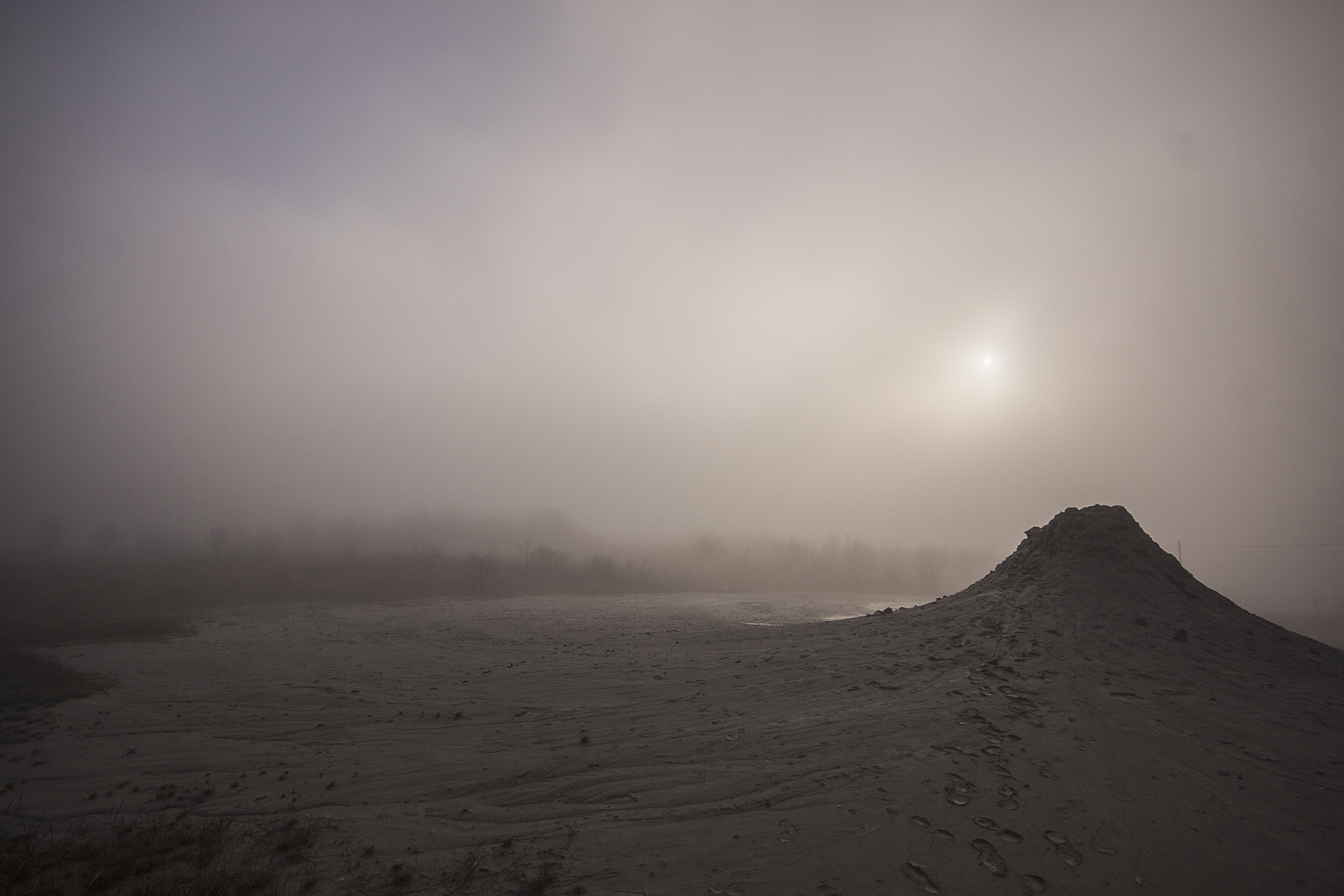 Riserva naturale Salse di Nirano nella nebbia This is a photo of a monument which is part of cultural heritage of Italy.